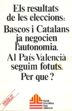 Cartell post-electoral del PSPV (poc abans de la absorció pel PSOE).